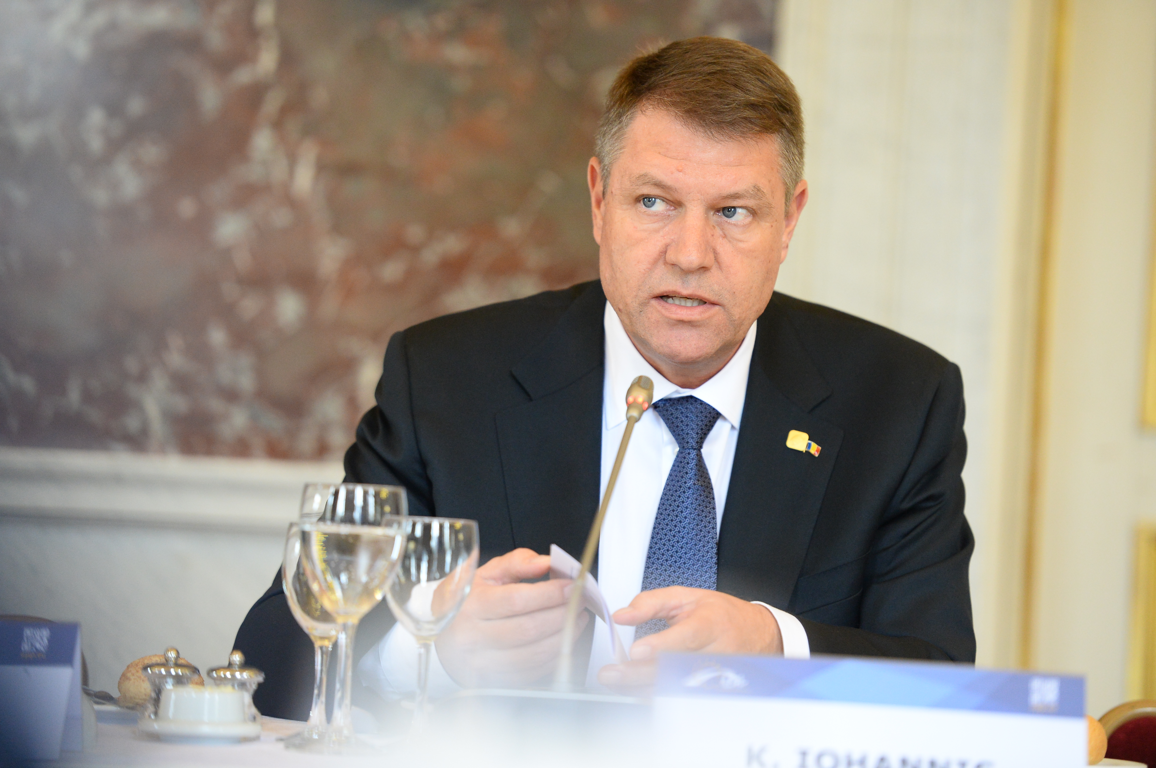 Klaus Iohannis at EPP Summit, March 2015, Brussels